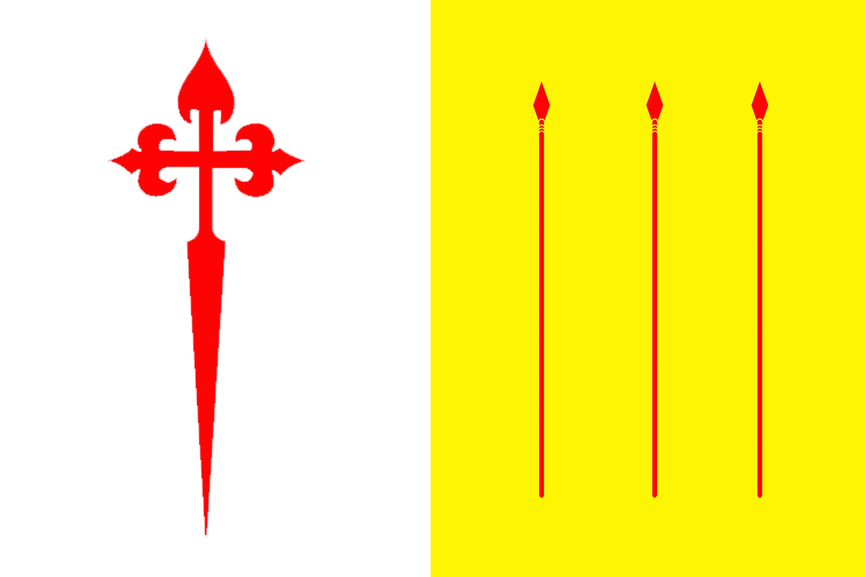 Bandera de la Provincia de Arauco